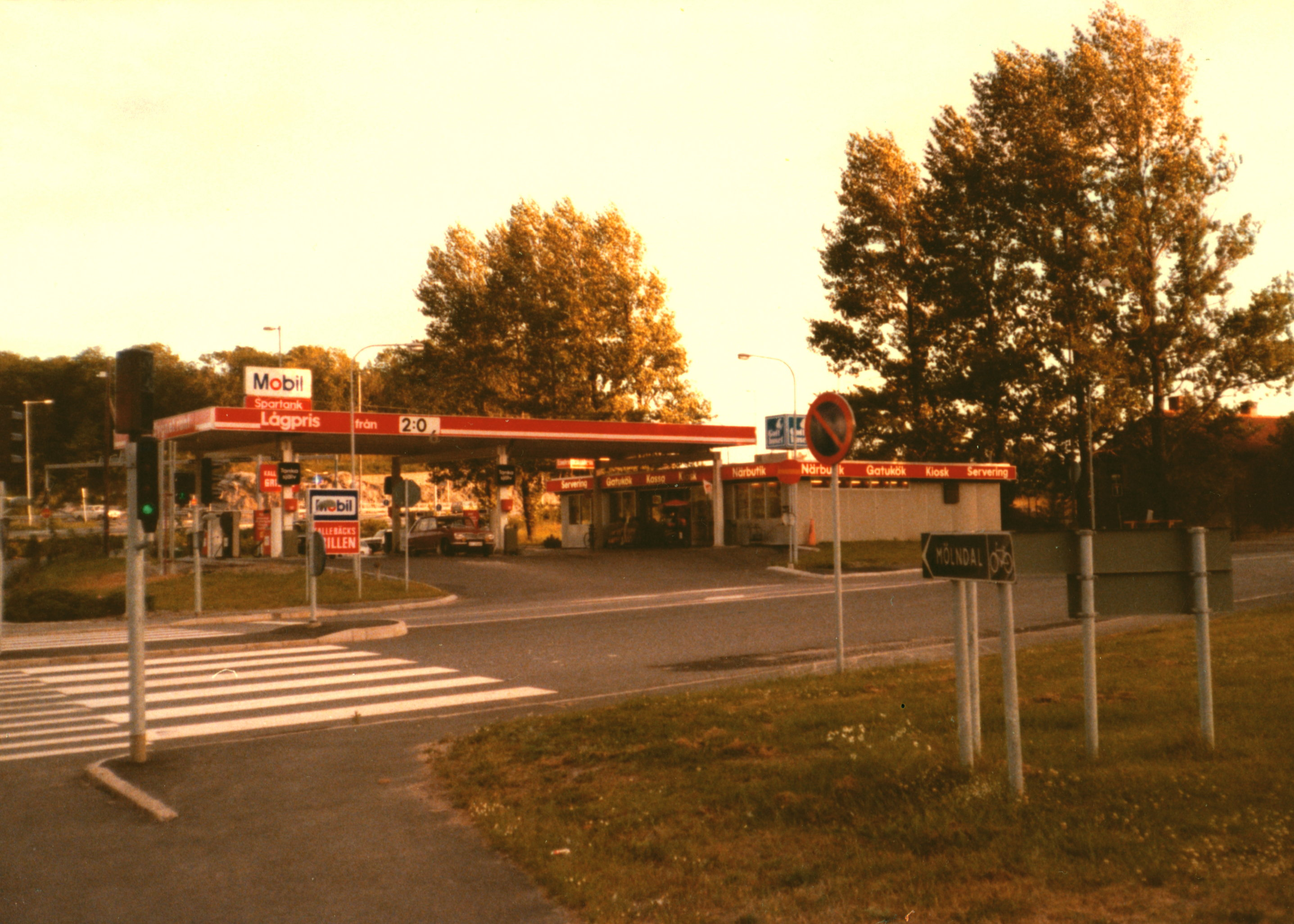 Mobil-mack, Kallebäck, 1979